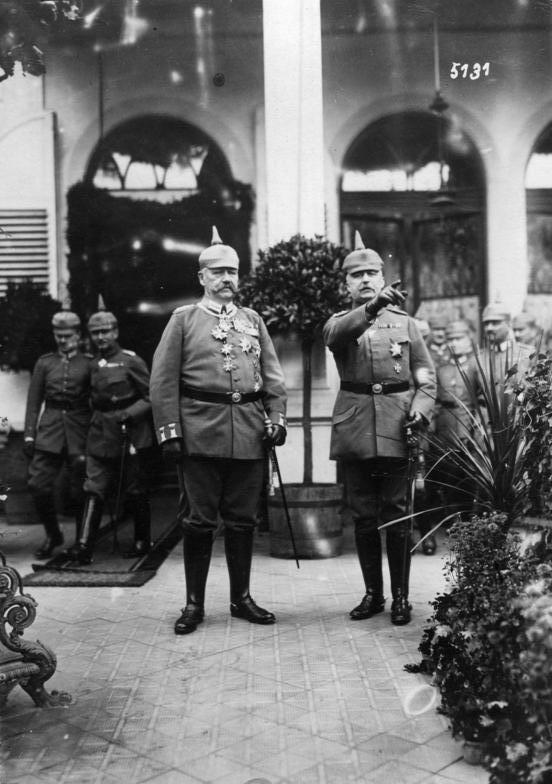 Scherl: Hindenburgs 70.Geburtstag. Hindenburg und Ludendorff b.[ei] d.[er] Feier im Großen Hauptquartier in Bad Kreuznach